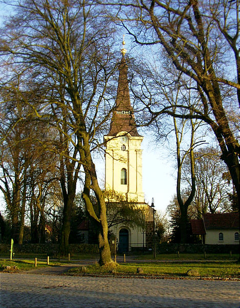 Dorfkirche Stolpe bei Hohen Neuendorf, Ansicht von Westen (Stadt Hohen Neuendorf, Landkreis Oberhavel, Brandenburg).